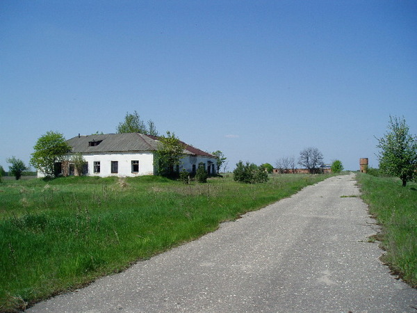 Будынкі ў вёсцы Вылева Добрушскага раёна